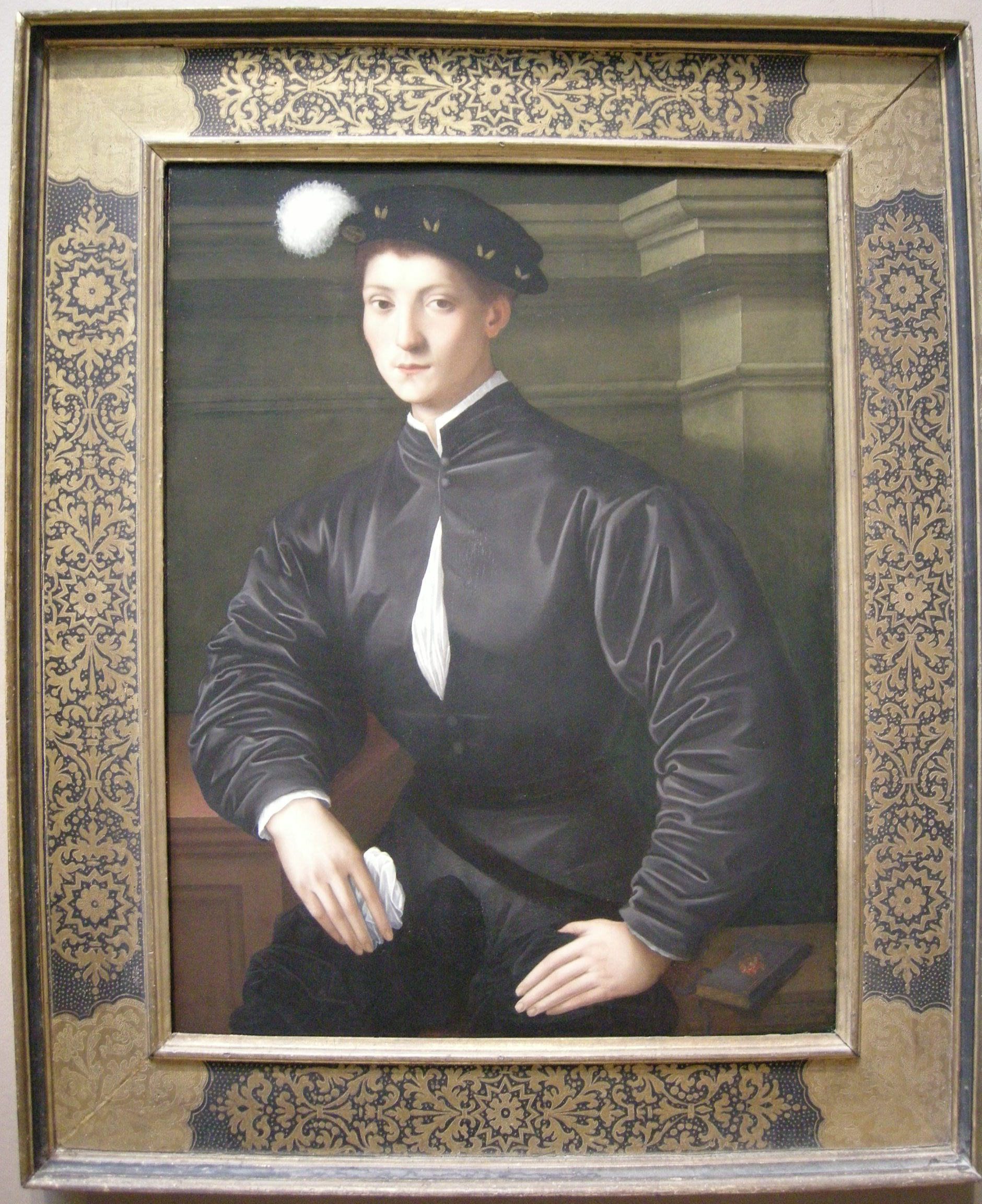 Pittore fiorentino del XVI secolo, ritratto di ugolino martelli, 1550 circa